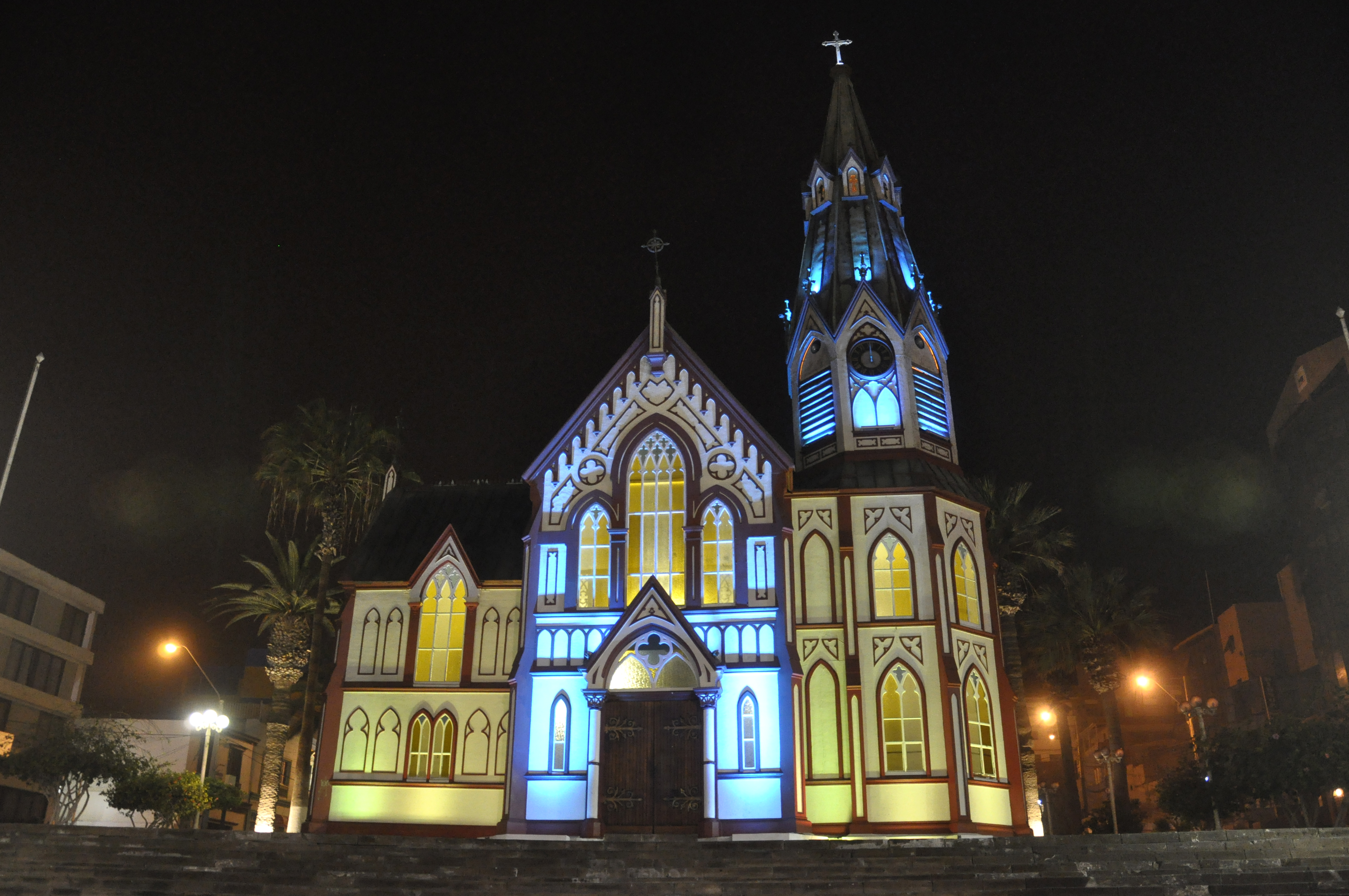 Catedral de San Marcos This is a photo of a national monument in Chile: 522